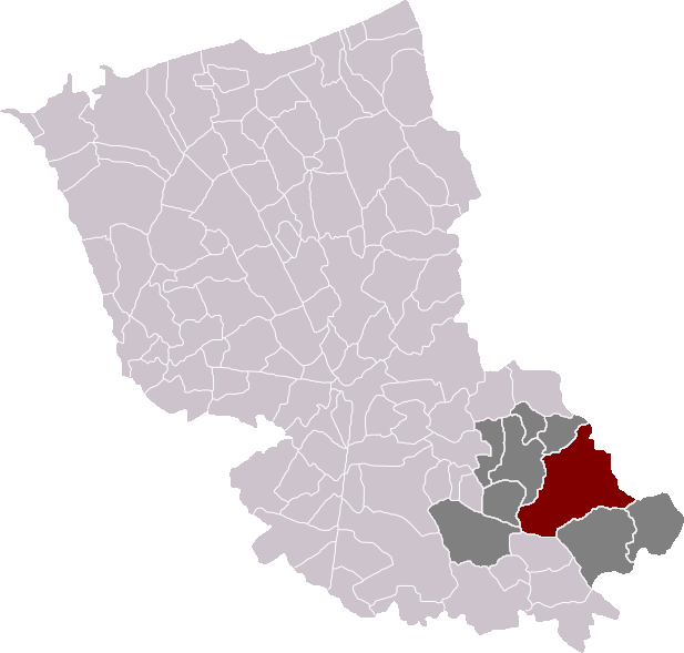 Locatie gemeente Belle in arrondissement Duinkerke. Zelfgemaakt. Location of Bailleul municipality in the arrondissement of Dunkirk. Self made. Localisation de la commune de Bailleul dans l'arrondissement de Dunkerque. Fait moi-même.